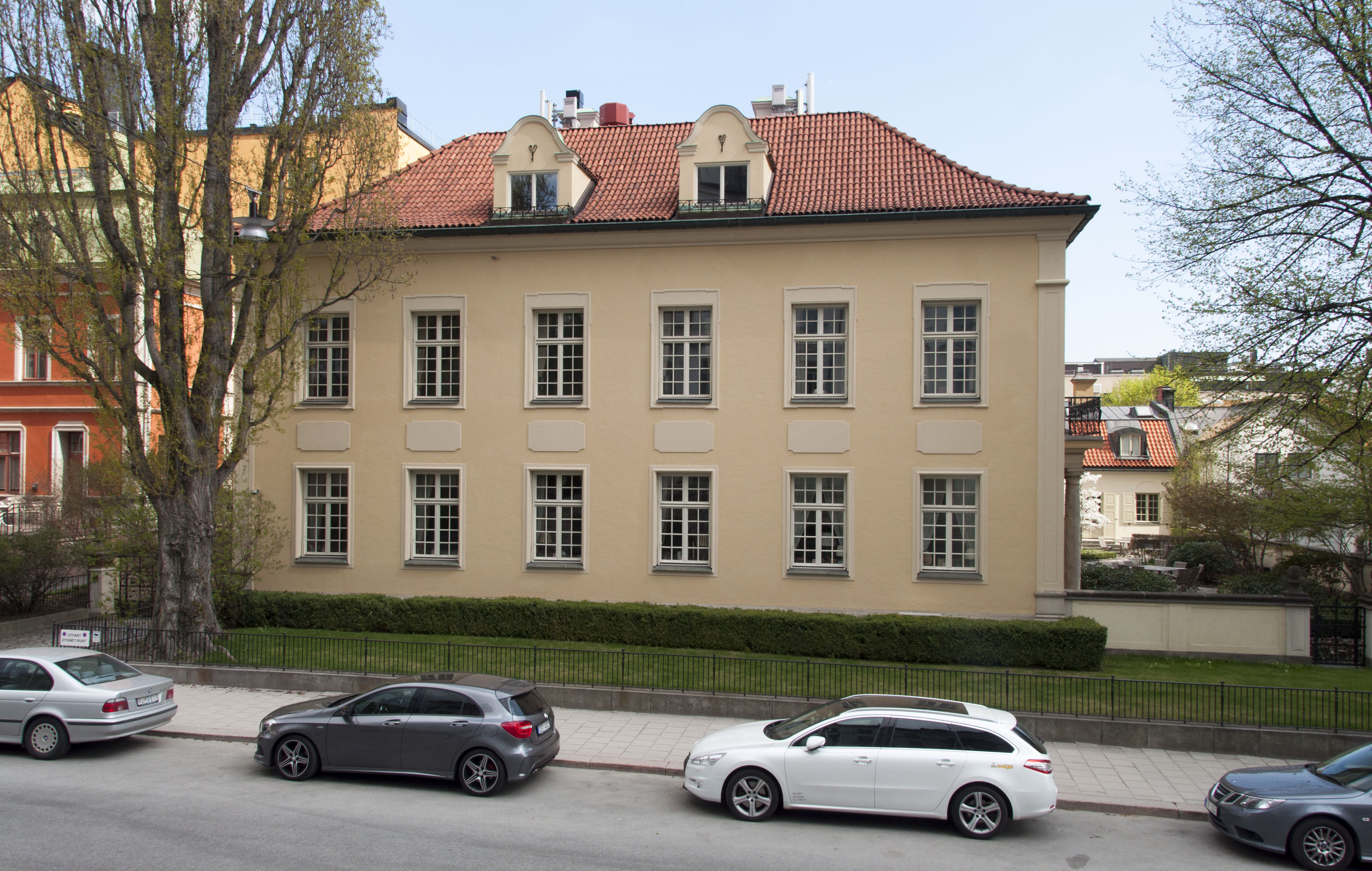 Linden 3, Villagatan 6, genomgipande ombyggnad 1917-18, arkitekt Ivar Tengbom, byggherre Erik Brodin, byggmästare E Nystrand. Ursprungligen uppförd 1878-79